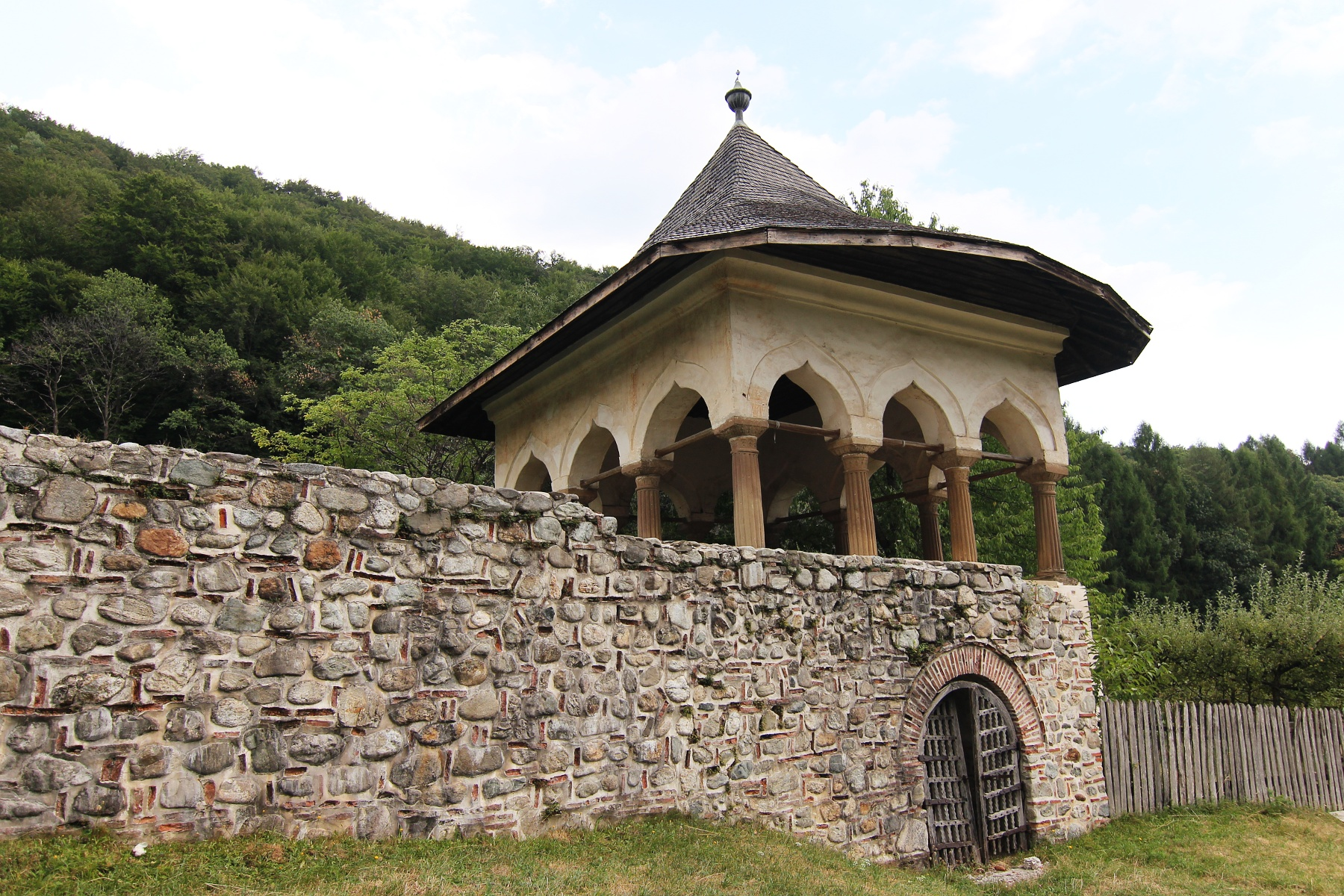 Ansamblul bolniței mănăstirii Hurezi, Foișor, bolința Hurezi 03